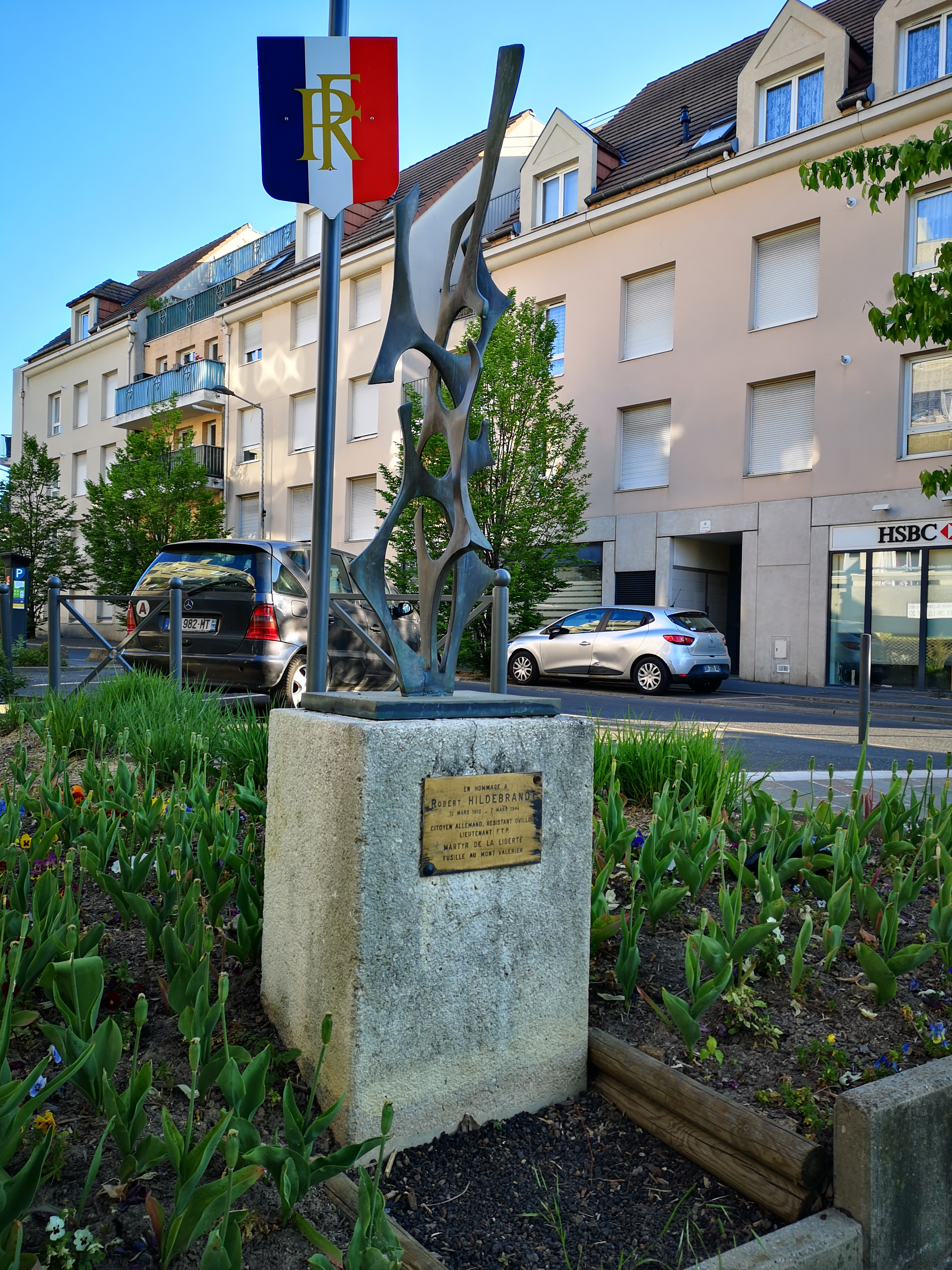 Photo de la stèle à la mémoire de Robert Hildebrandt à Houilles Yvelines